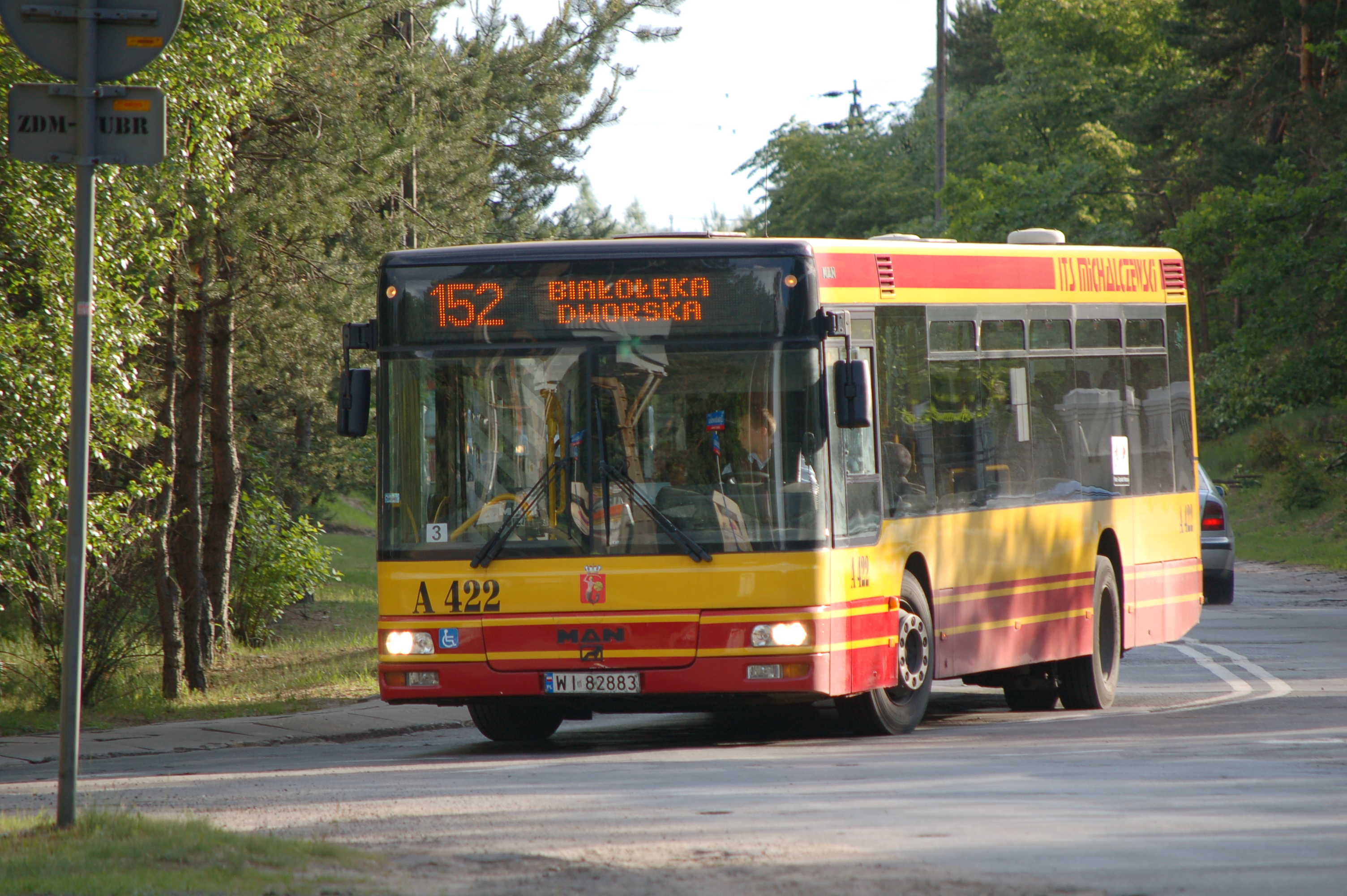 Autobus MAN (#A422, nr rej. WI 82883) linii 152 na ulicy Wałuszewskiej.